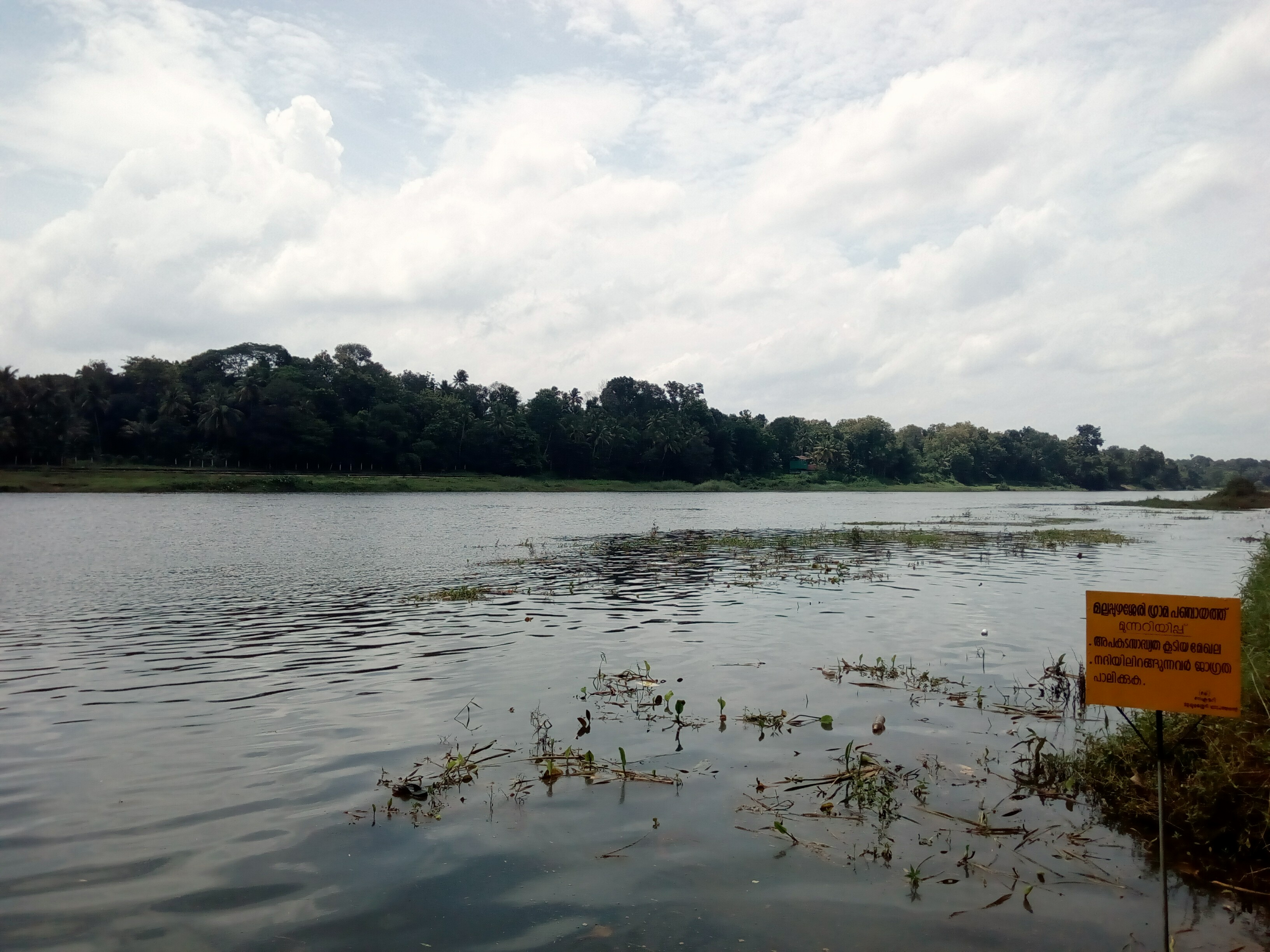 Pampa river at Aranmula